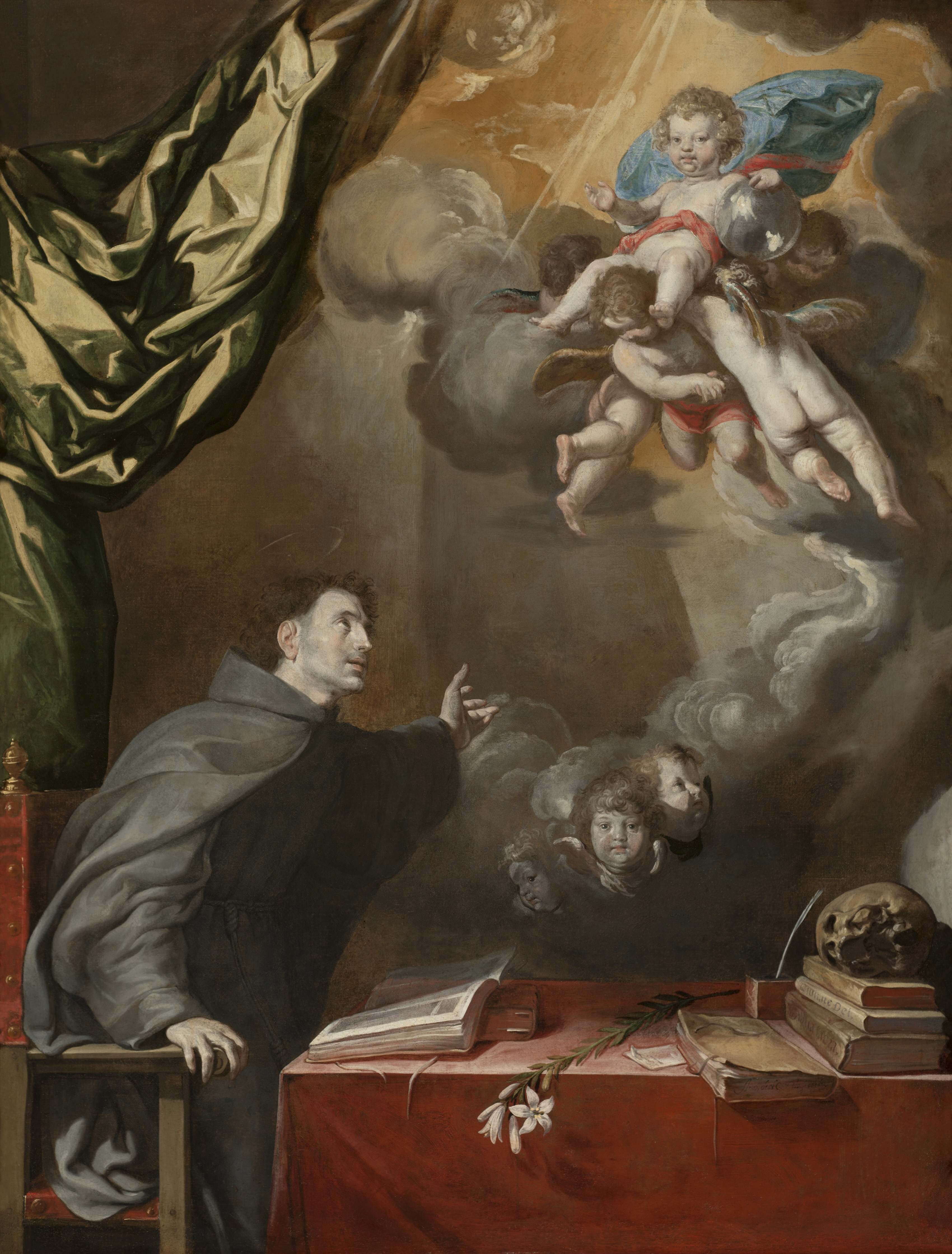 La obra muestra al Niño Jesús apareciéndose a San Antonio de Padua.